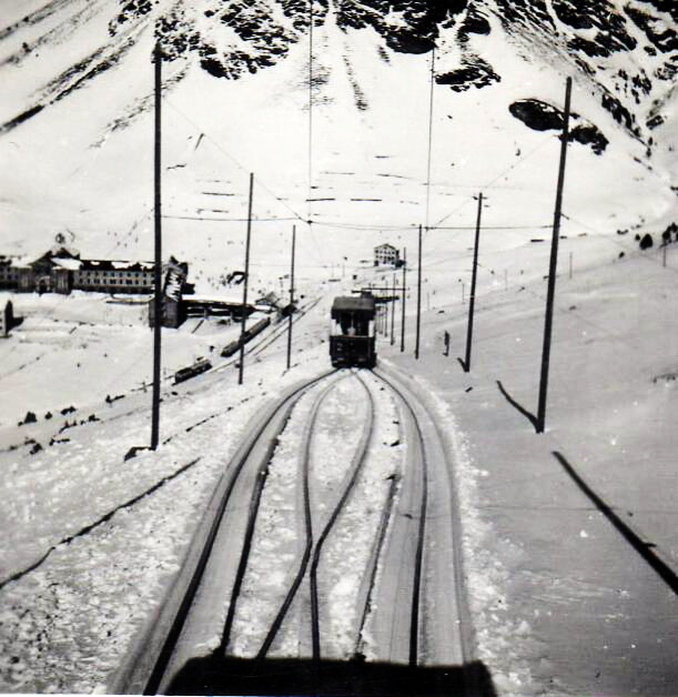 Funicular Núria-Coma del Clot